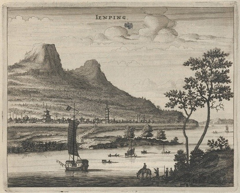 Illustration from Olfert Dapper (1670): Gedenkwaerdig bedryf der Nederlandsche Oost-Indische Maetschappye